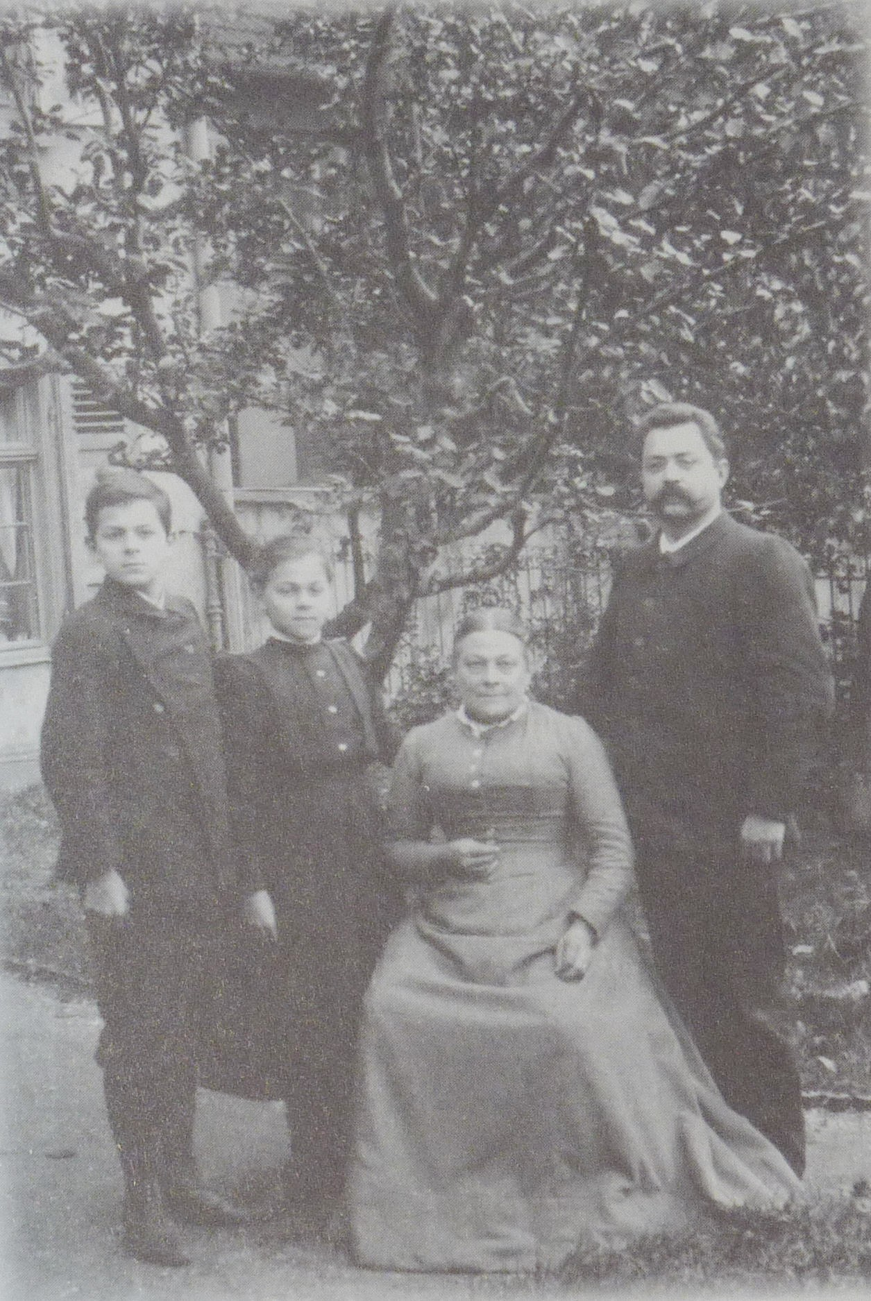 der junge Erich Schairer und seine Familie